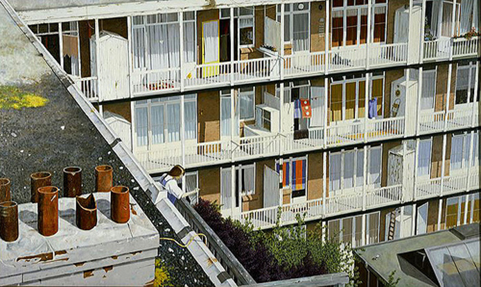 Schilderij stadsgezicht.